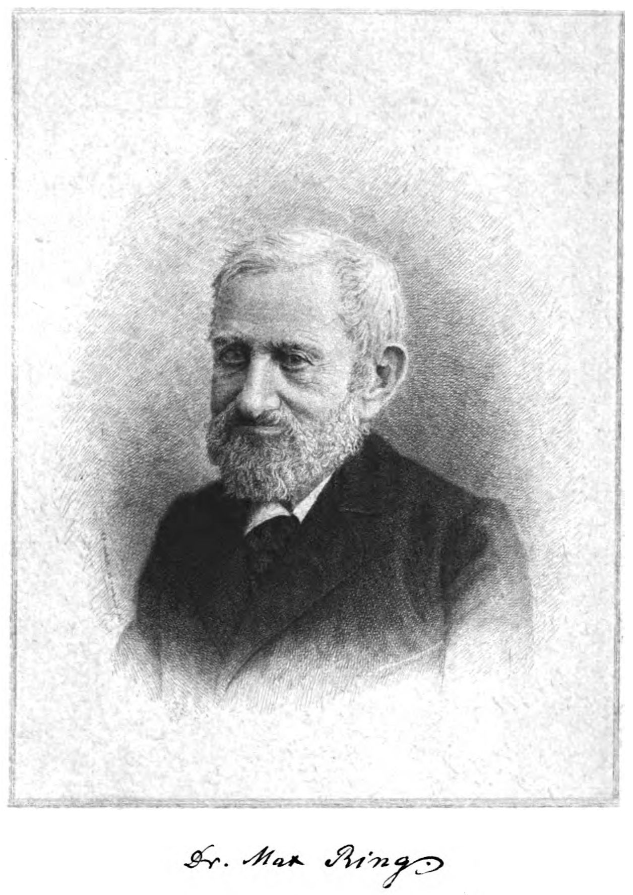 Porträt: Max Ring. Radierung von Johann Lindner in München. In: Nord und Süd. Eine deutsche Monatsschrift. Herausgegeben von Paul Lindau. S. Schottländer, Breslau, 84. Band. 1898